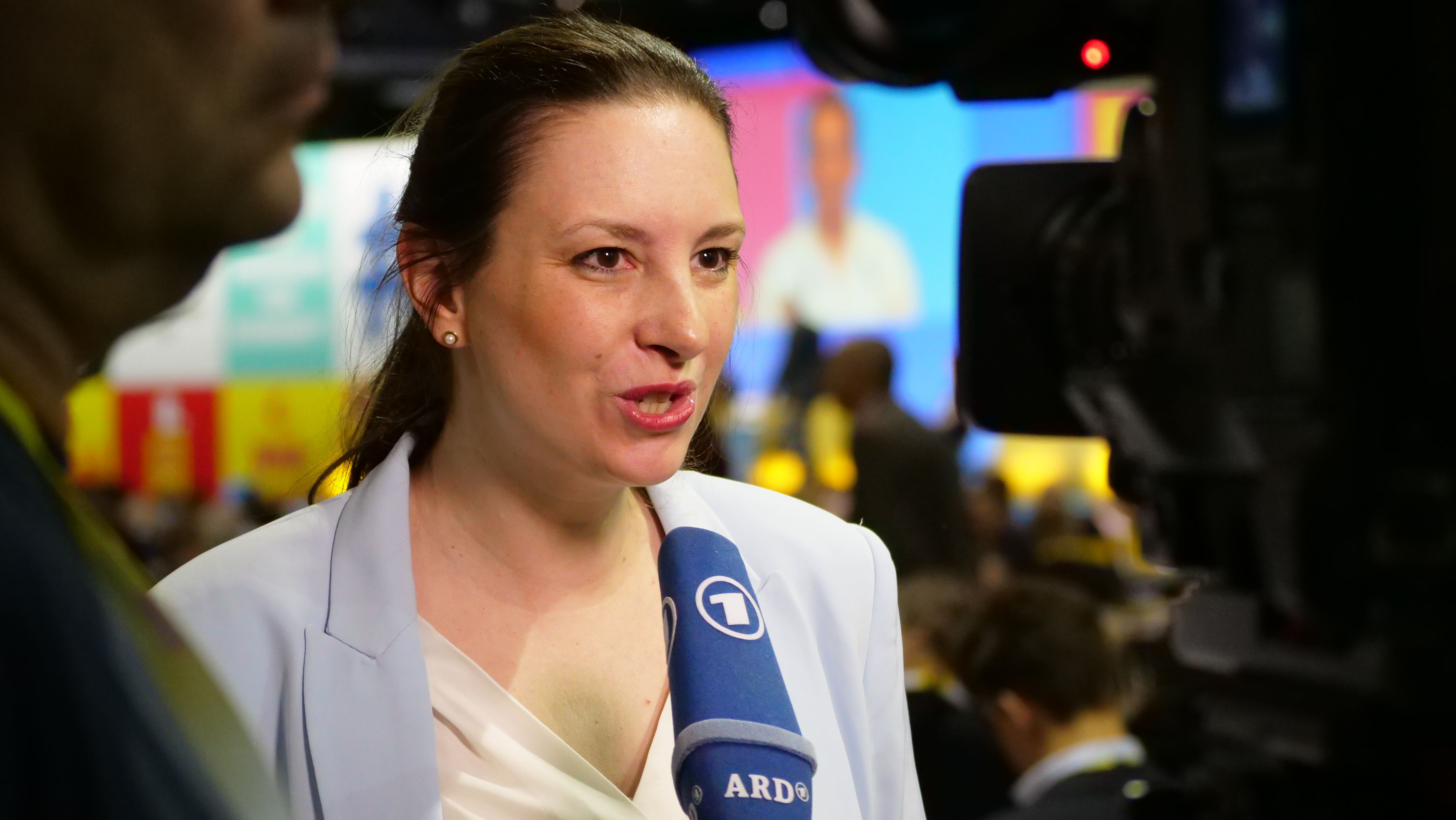 Dr. Maren Jasper-Winter auf dem 70. Ordentlichen Bundesparteitag der FDP im Interview mit der ARD